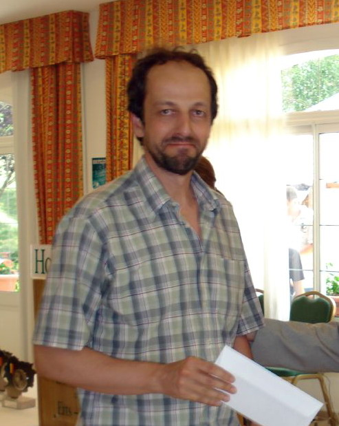 Anthony Kosten (14è classificat), XXV Open Internacional d'Andorra 2007. Hotel St Gothard, Erts La Massana. Cloenda.